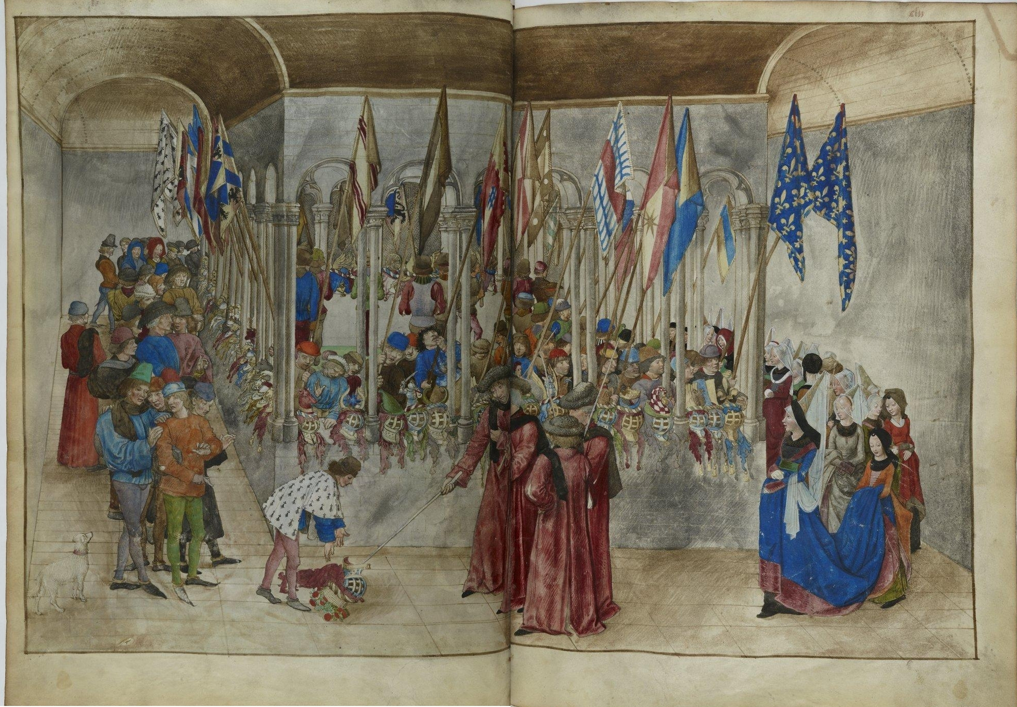 Turnierbuch des René von Anjou, Paris, Bibliothèque nationale, Ms. fr. 2693